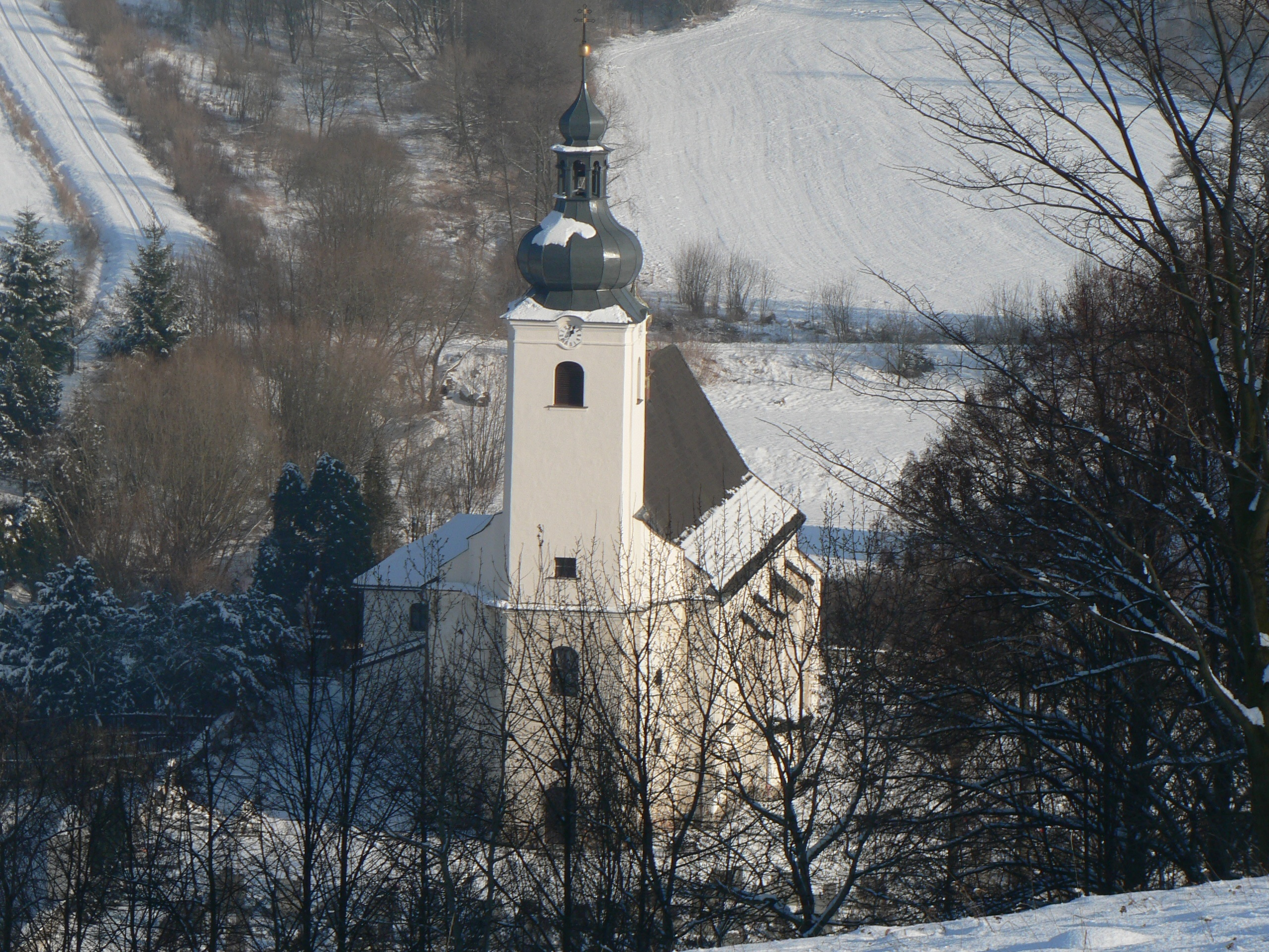 Kostel svatého Vavřince (Sobotín)